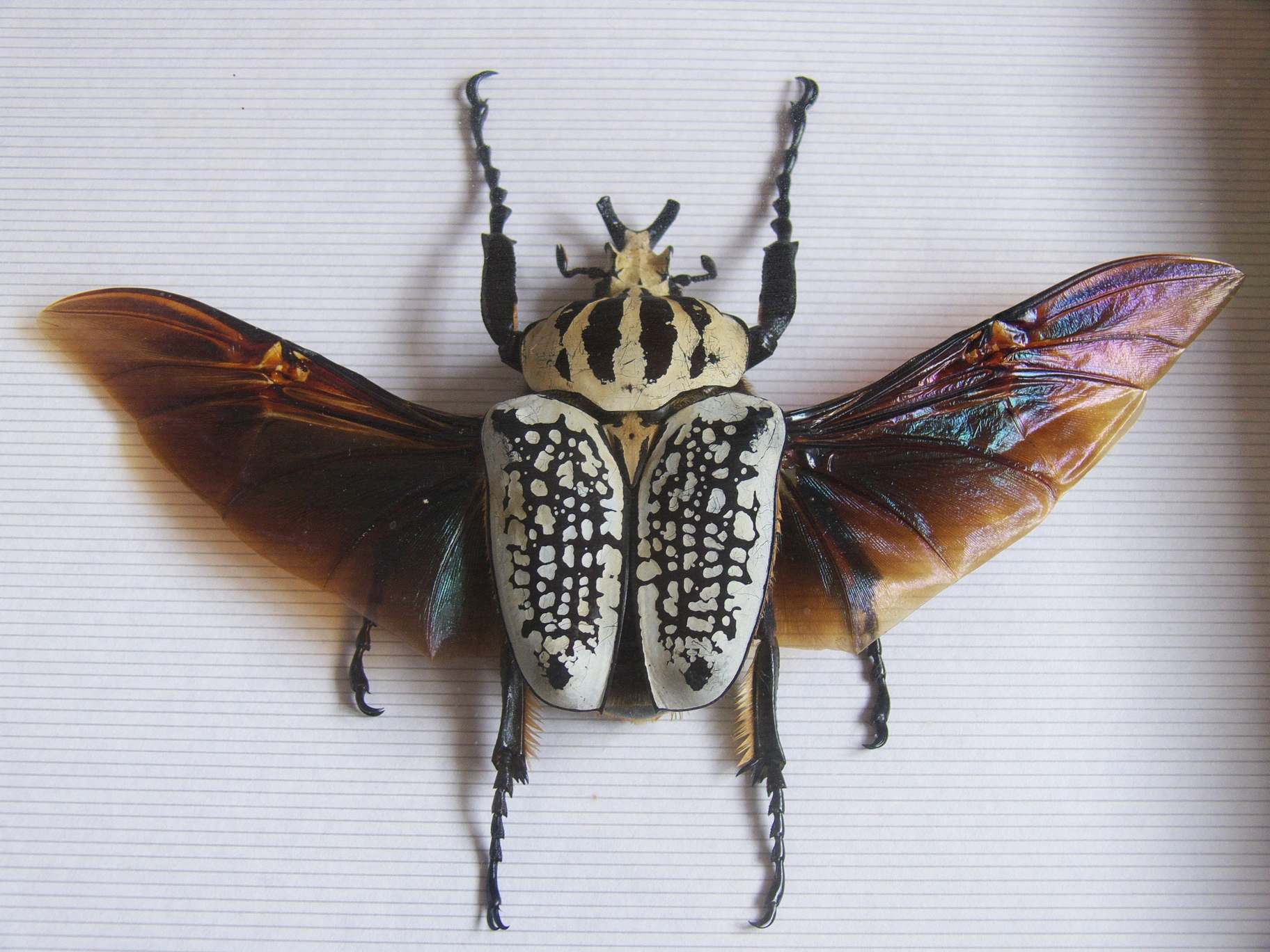 Goliathus orientalis, mâle, ailes étalées